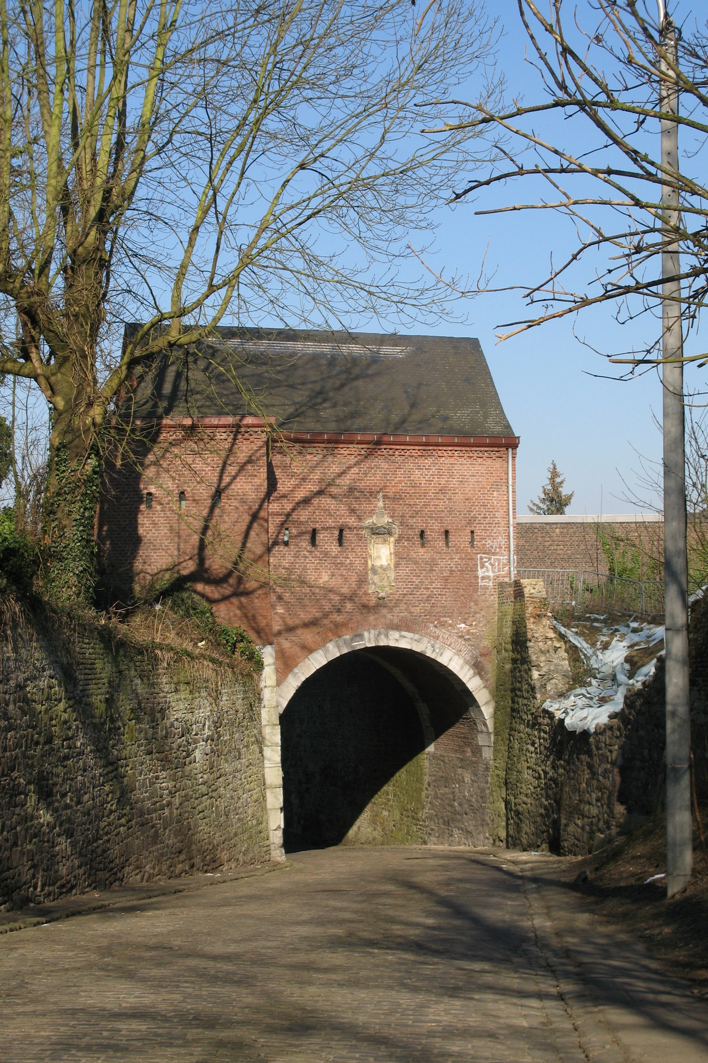 Paart vun der Festung an der Strooss Thier de la Chartreuse.